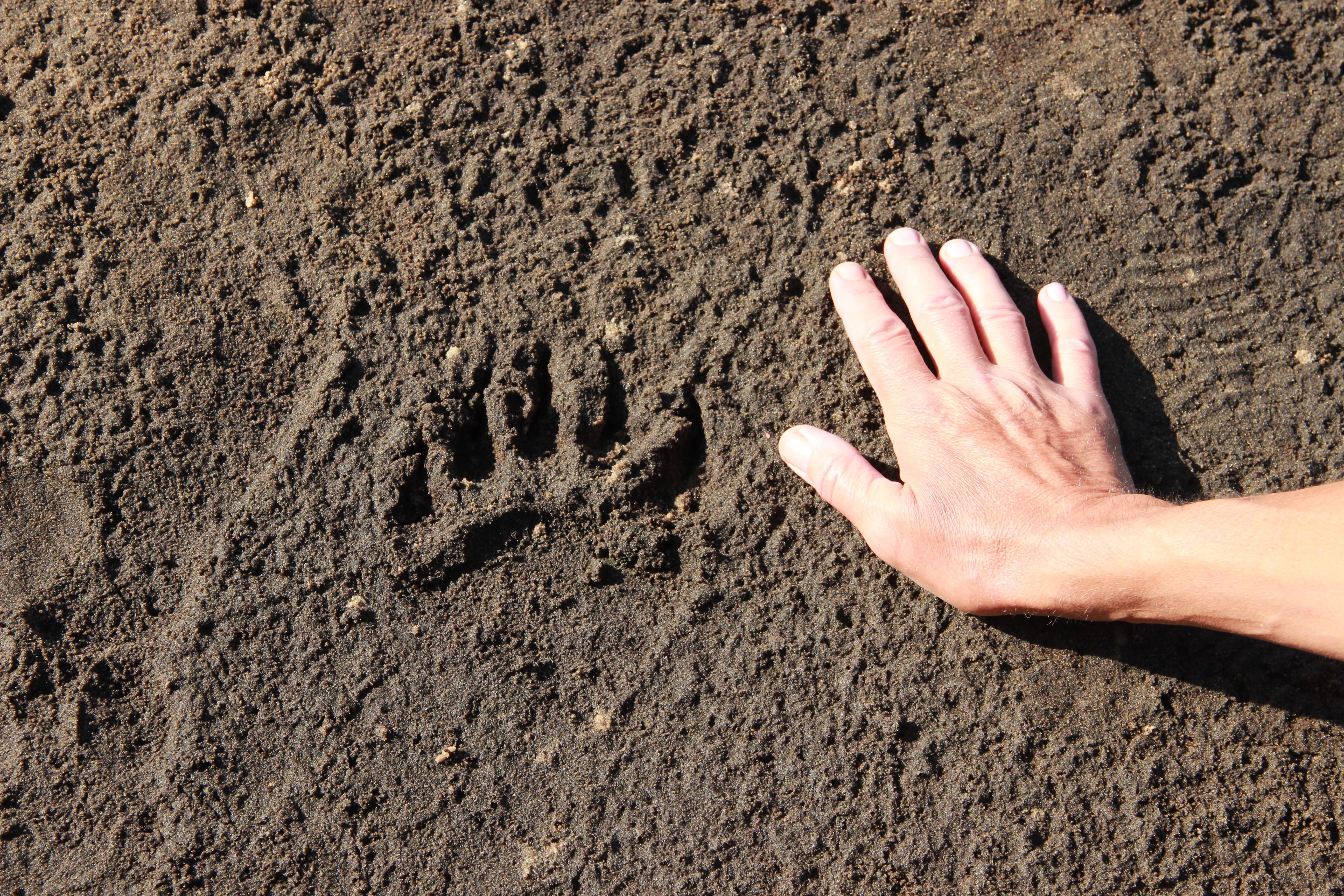 Большая Кокшага: Заповедник расположен в среднем течении левого притока Волги реки Большая Кокшага на территории Килемарского и Медведевского районов Республики Марий Эл на расстоянии 30 км от ее столицы г. Йошкар-Ола. Координаты крайних точек заповедника: северной - 56°46' с.ш., южной - 56°37' с.ш., западной - 47°09' в.д., восточной - 47°26' в.д, Килемарский район, Марий Эл This image is related to the protected area of Russia number 1200036